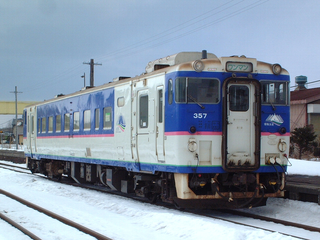 JR北海道キハ40形気動車（キハ40 357）JR北海道日高本線鵡川駅で撮影